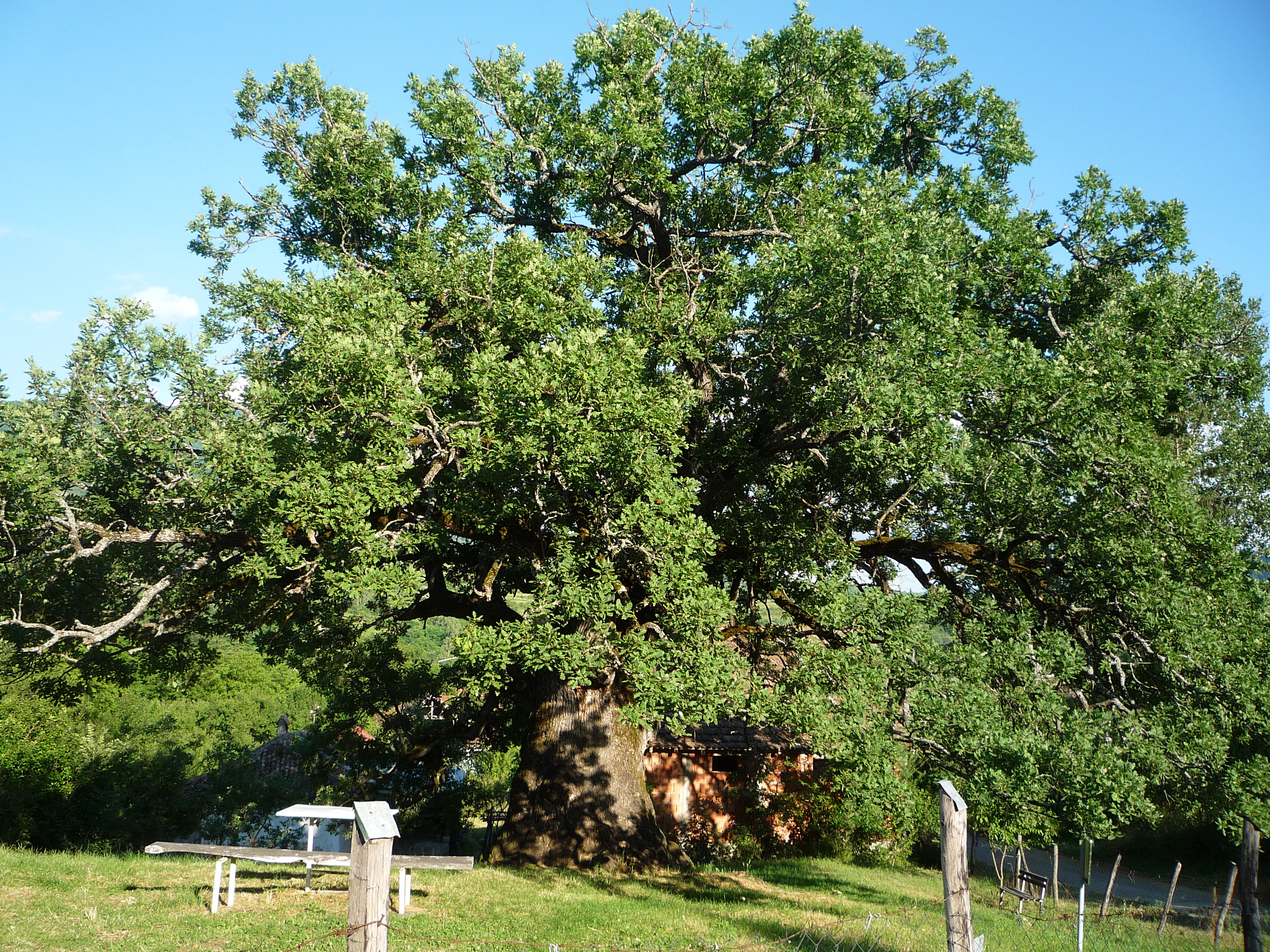 Српски (ћирилица): Ово је фотографија заштићеног природног добра у Србији под шифром: СП240This is a a photo of a natural area in Serbia with ID: СП240 Природни споменик Стабло храста китњака у селу Дивљана